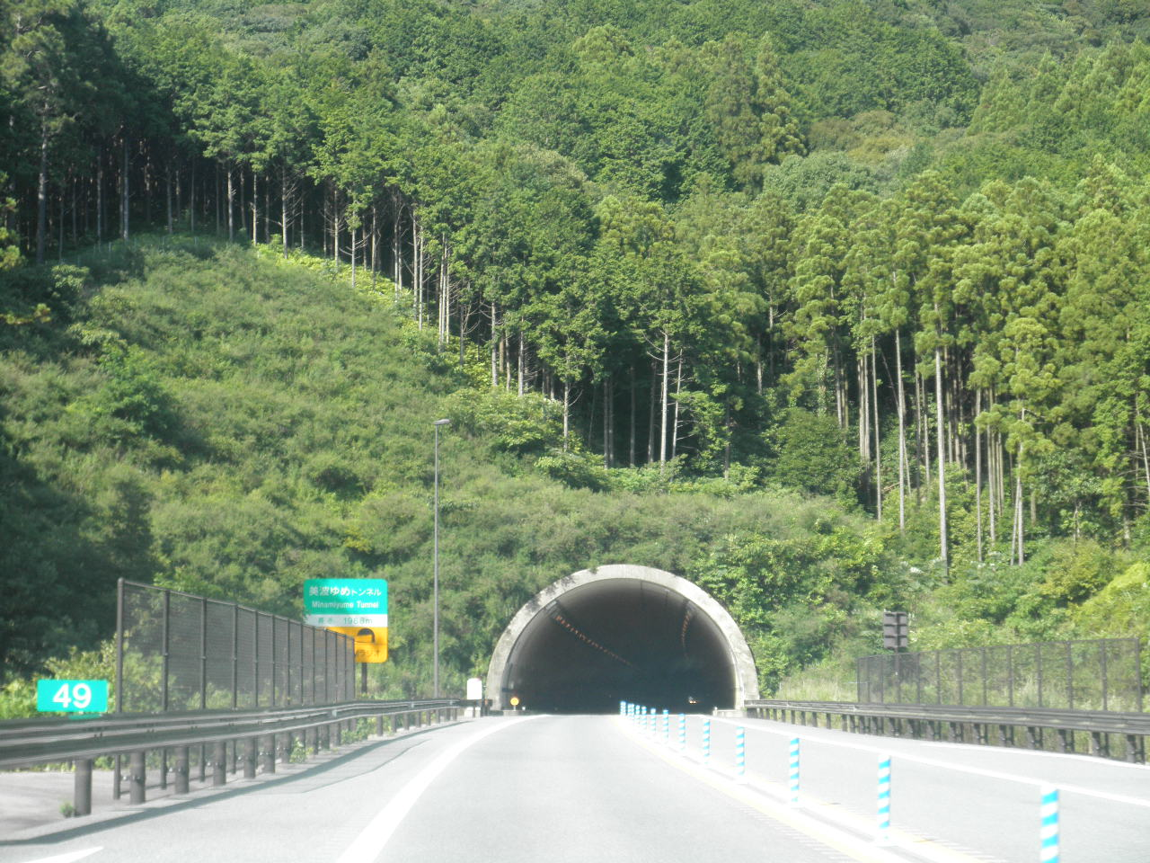 美波ゆめトンネル （国道55号日和佐道路）